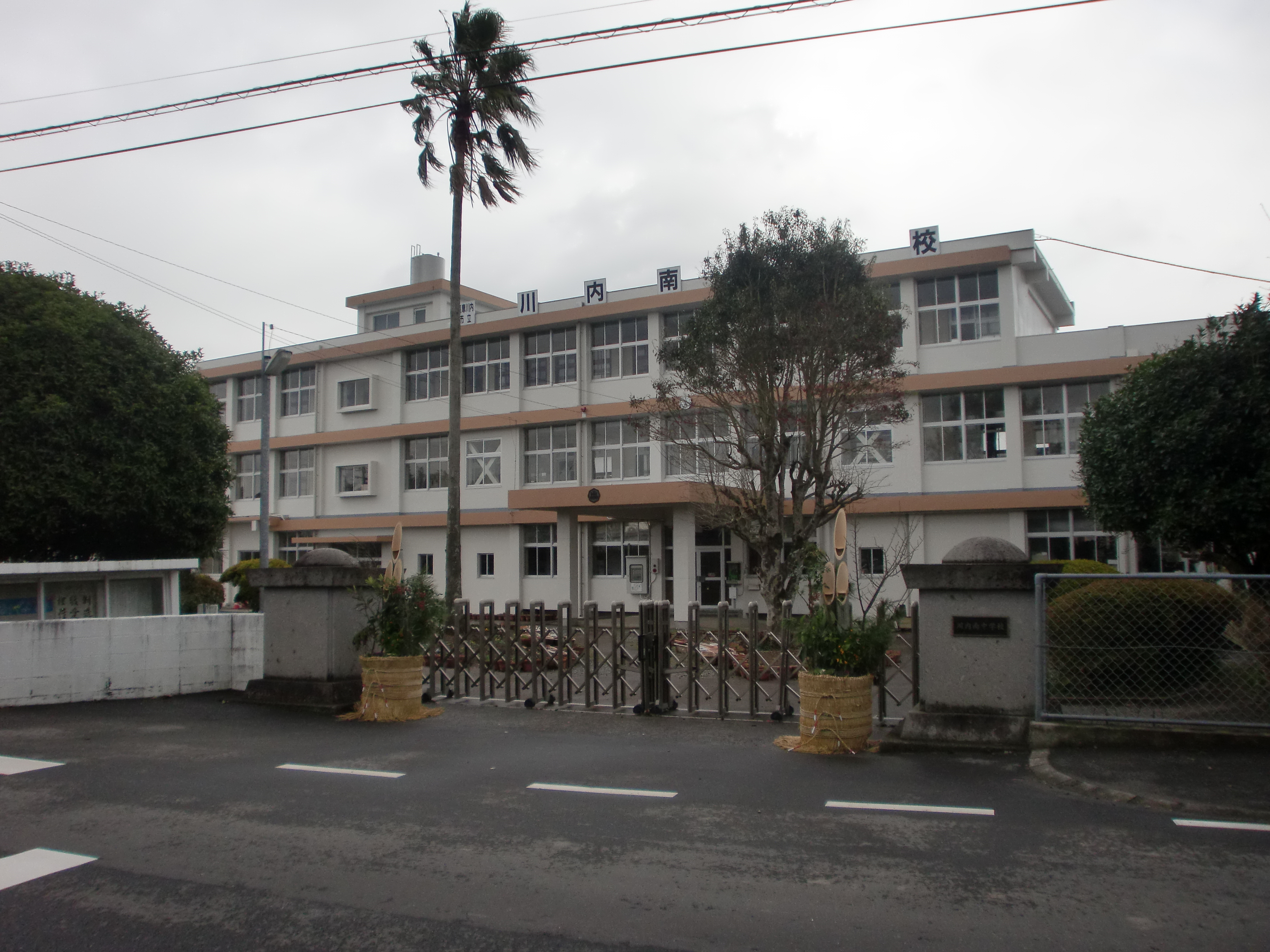 薩摩川内市立川内南中学校の外観。